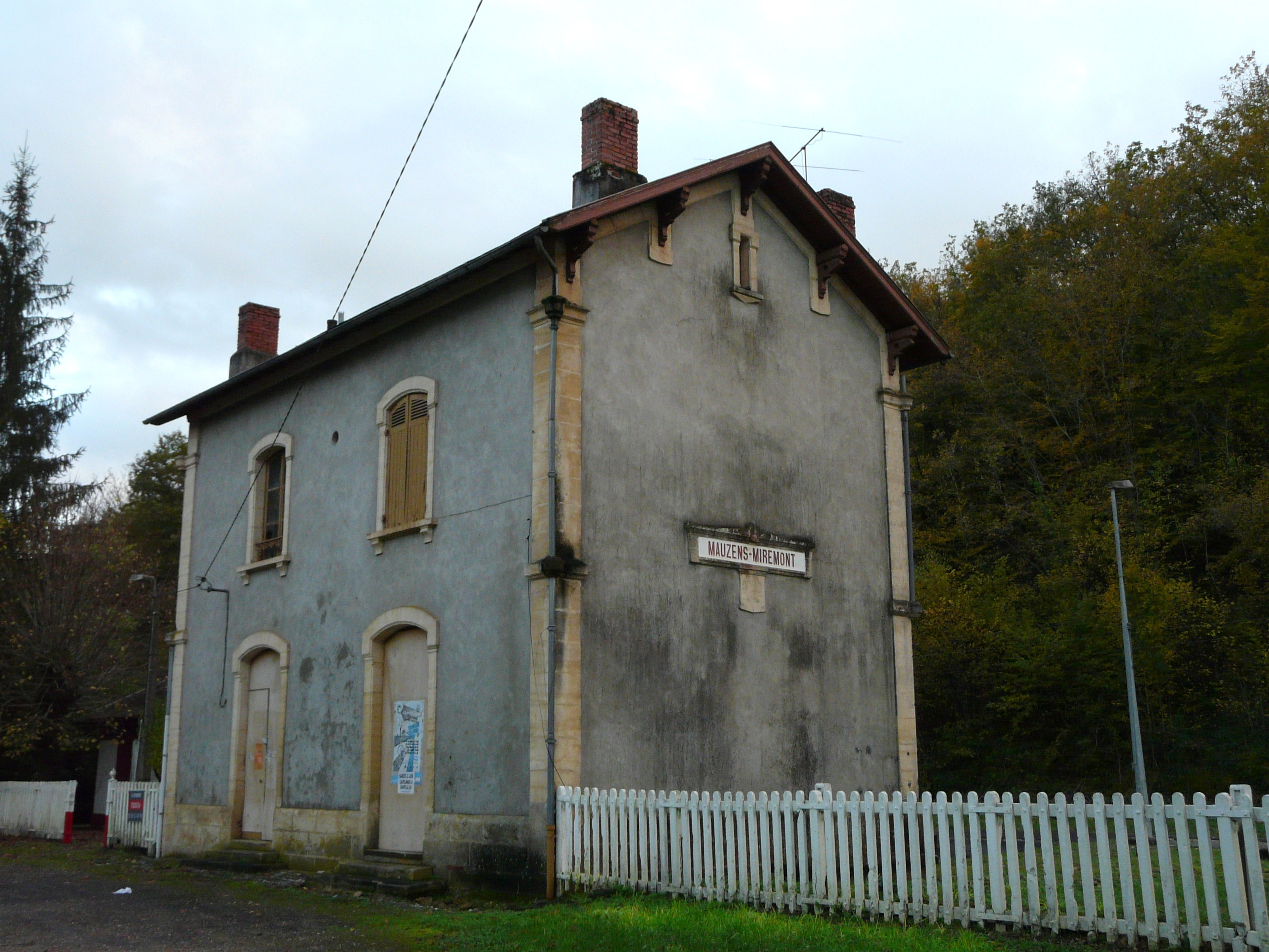 L'ancien bâtiment de la gare de Mauzens-Miremont, Mauzens-et-Miremont, Dordogne, France.